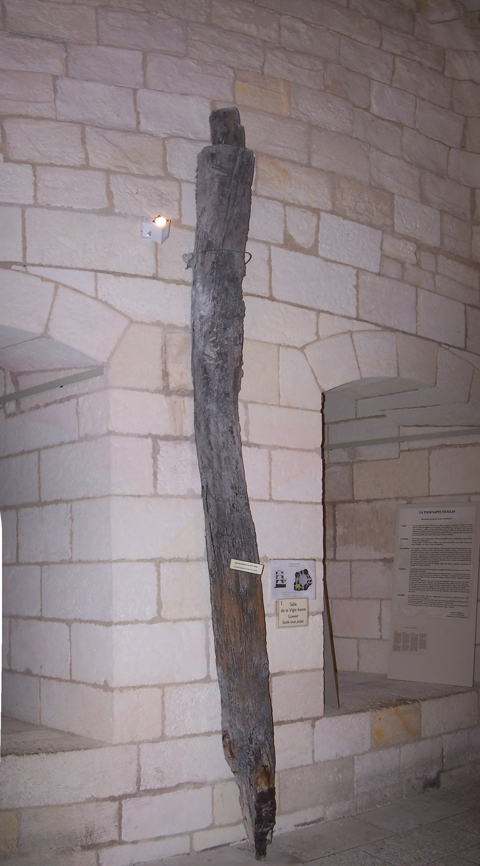 Photographie d'un des pieux de chêne ayant servi à faire les fondations de la tour Saint-Nicolas (XIVe - XVe siècle), qui est, avec la tour de la Chaîne et la tour de la Lanterne, l'une des trois tours du front de mer de La Rochelle, et l'une des deux tours emblématiques du Vieux-Port. Elle a été classée monument historique en 1879. L'inclinaison de la tour est due à un affaissement du terrain, lors de la construction. La construction de la tour débute vers 1345, alors que la ville de La Rochelle est sous occupation anglaise. De longs pieux de chêne ferrés sont d'abord enfoncés dans la vase et calés à l'aide de pierres, puis l'ensemble est recouvert d'un radier (plancher de poutres), l'ensemble faisant office de fondations. Cependant, le poids de la tour et la nature instable du terrain provoquent tout de même son enfoncement et son basculement. Les constructeurs, qui ne parviennent pas à la redresser, décident de la stabiliser et interrompent le chantier. Ce n'est qu'en 1372, date à laquelle La Rochelle redevient française, que le chantier reprend, symbolisant l'alliance entre Charles V, roi de France, et la ville. Il sera achevé en 1376. La tour est aujourd'hui encore inclinée de 2%, signe de l'enfoncement constaté pendant sa construction. La rampe d'accès, qui permet aujourd'hui d'accéder au premier étage, n'existait pas à l'origine, et n'a été construite qu'en 1569.